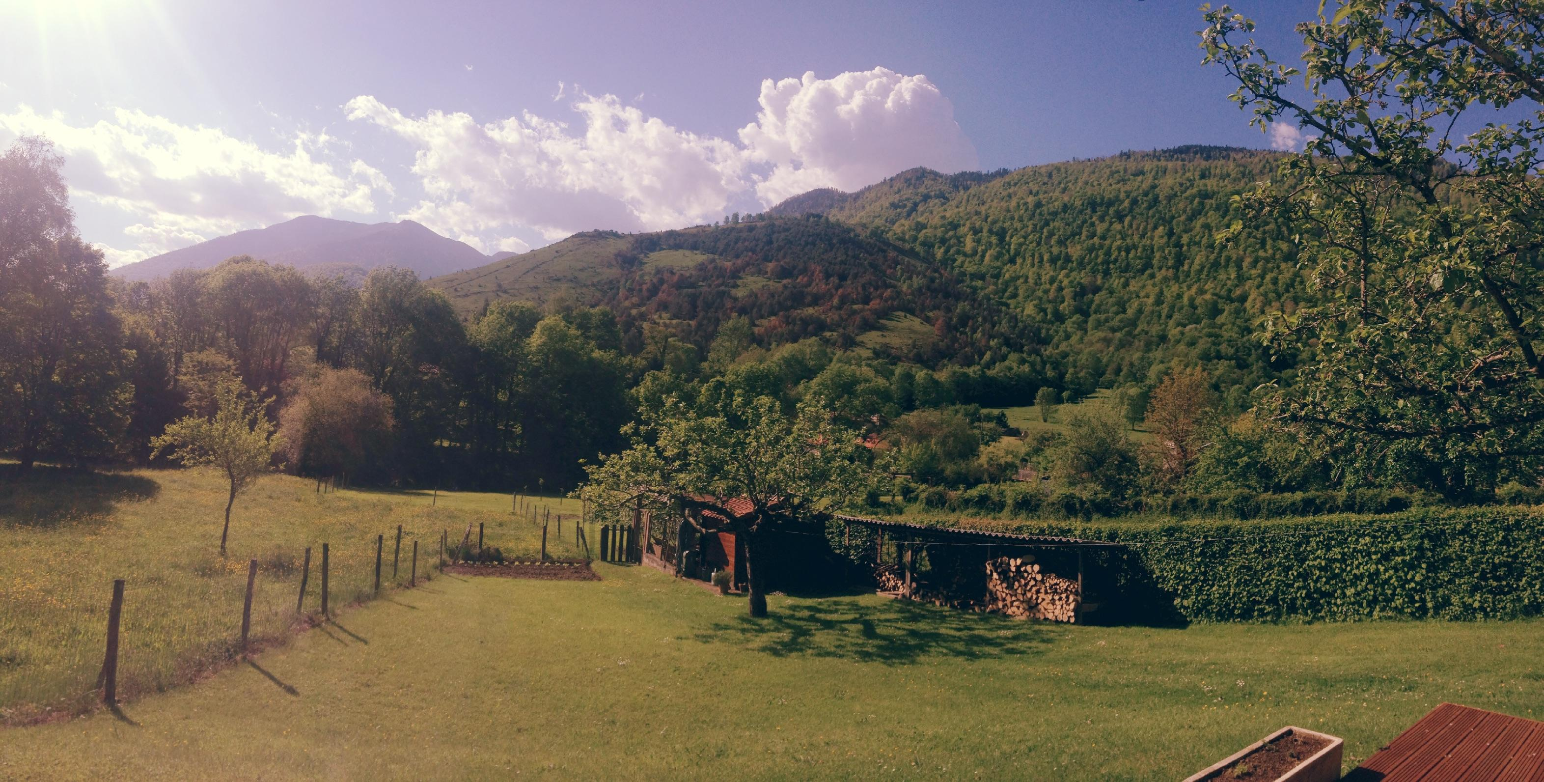 Commune de moncaup